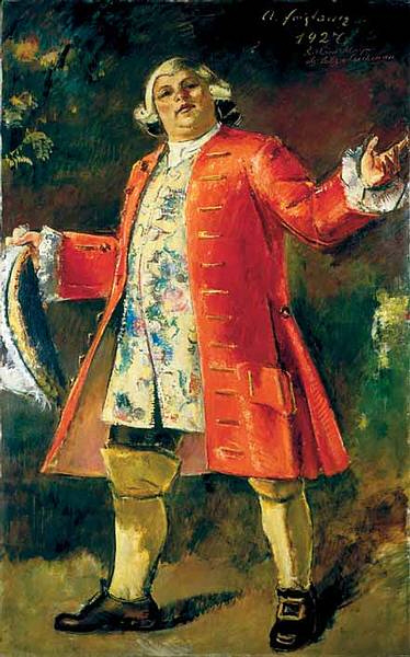 Richard Mayr im Kostüm des Ochs auf Lerchenautitle QS:P1476,de:"Richard Mayr im Kostüm des Ochs auf Lerchenau" label QS:Lde,"Richard Mayr im Kostüm des Ochs auf Lerchenau"